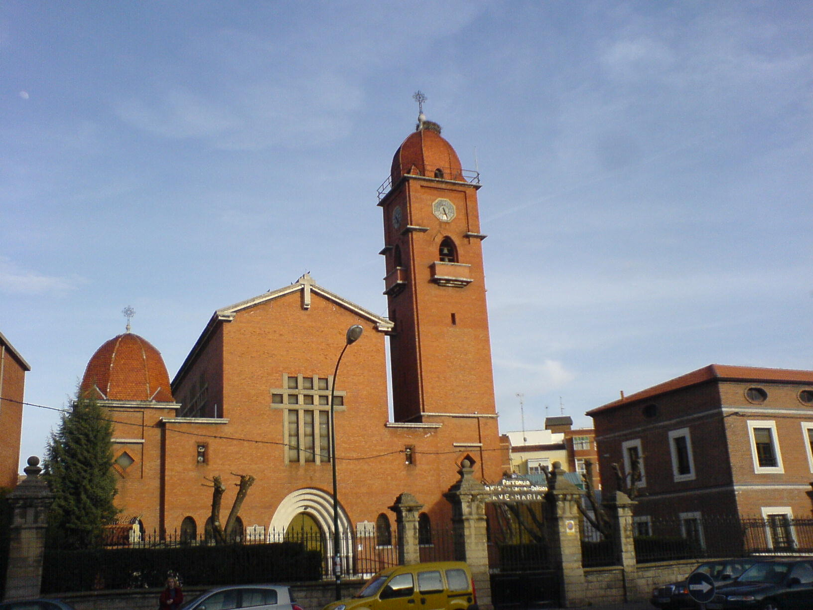 Barrio de Las Delicias, Iglesia del Carmen